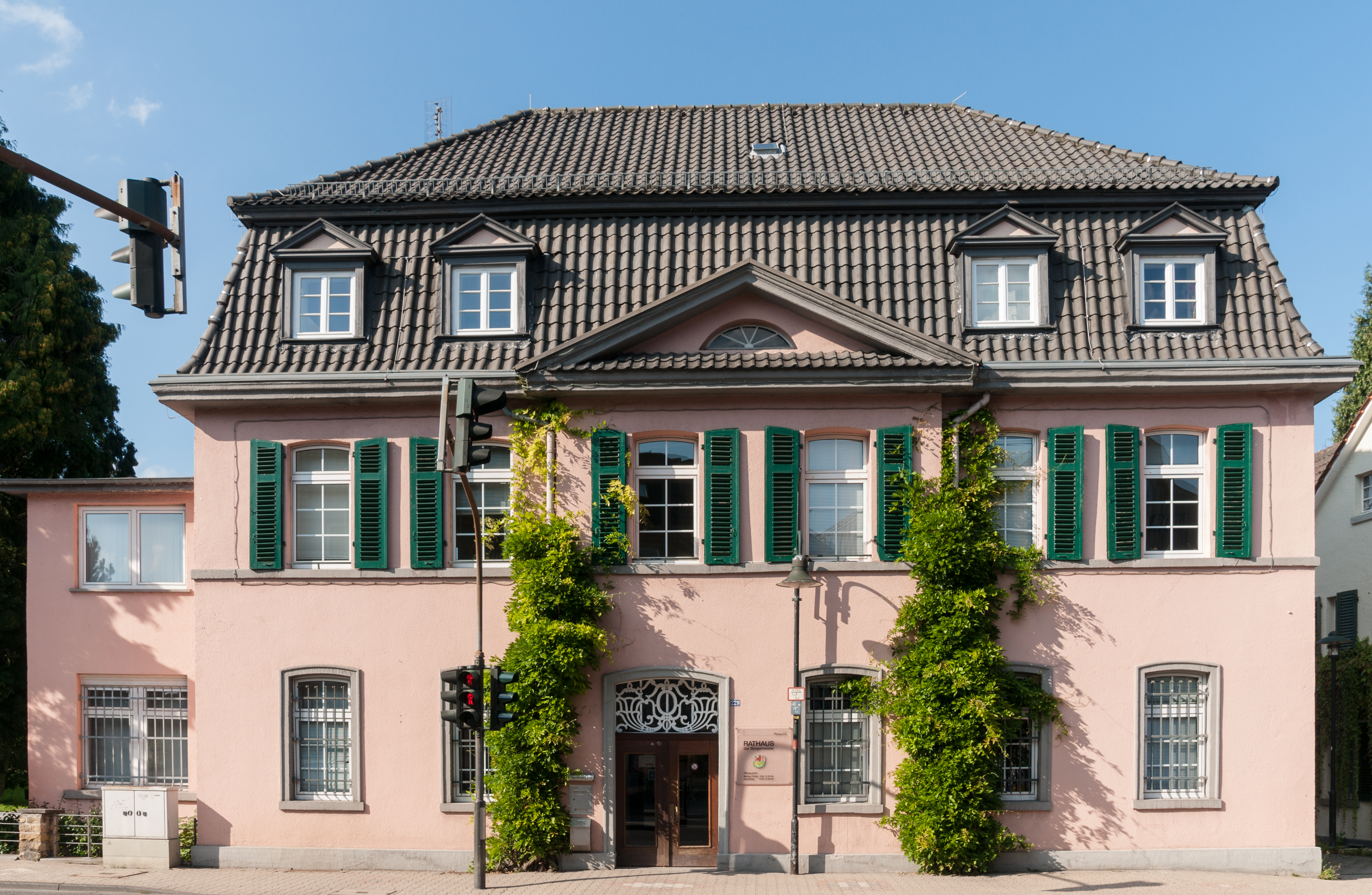 Rösrath, Deutschland: Denkmalnummer 3, Hauptstrasse 229 (Rathaus Hoffnungsthal)